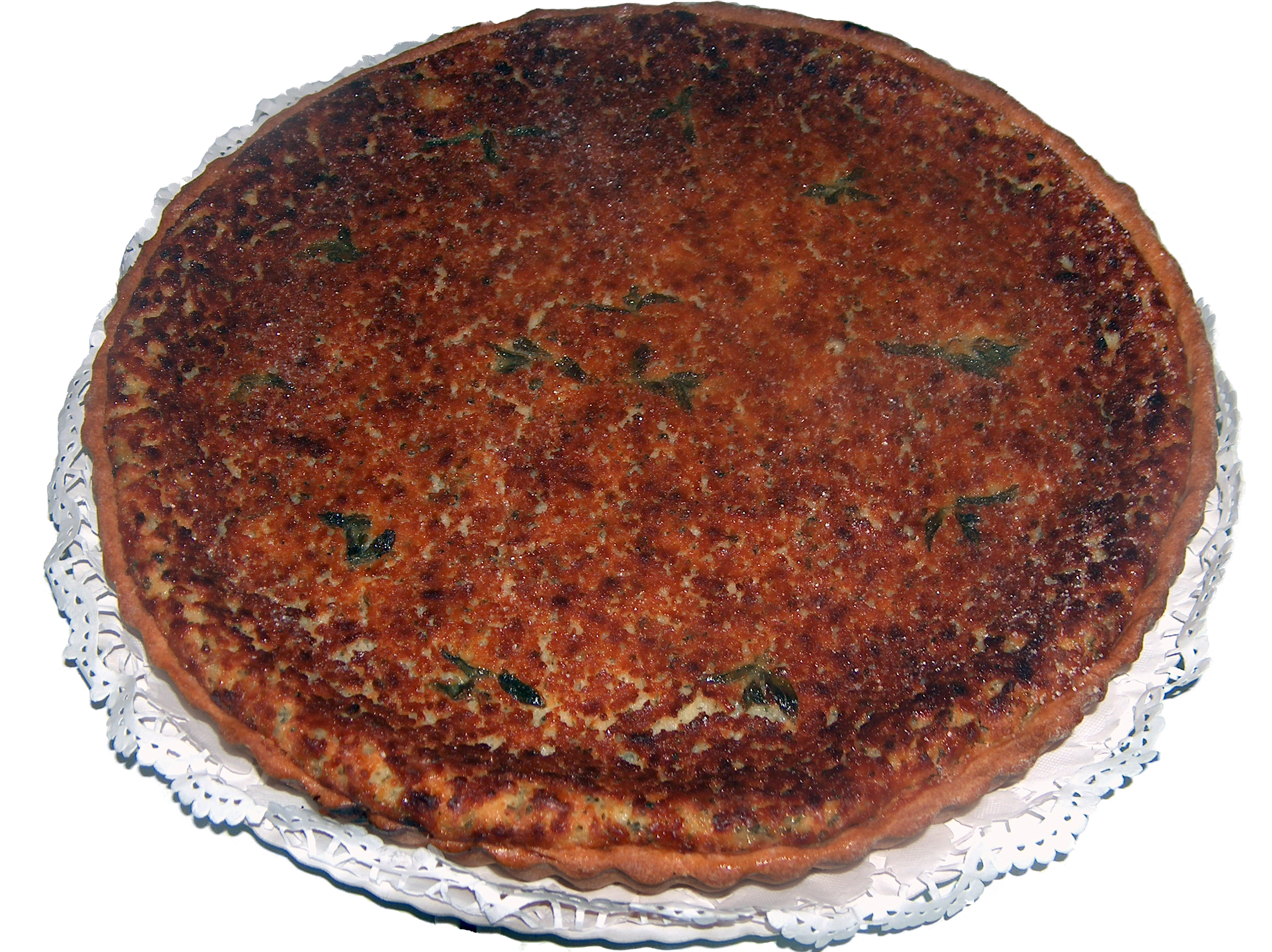 Flaó típic d'Eivissa.